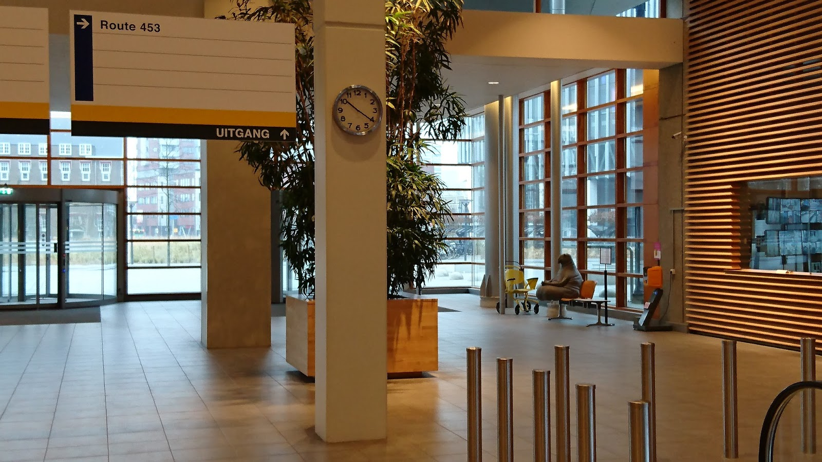 Новое место расположения Ждуна у входа в госпиталь